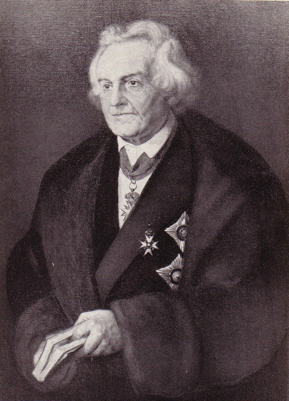 Karl von Hase (1800-1890), Dr.phil. D.h.c. Dr.jur.h.c.